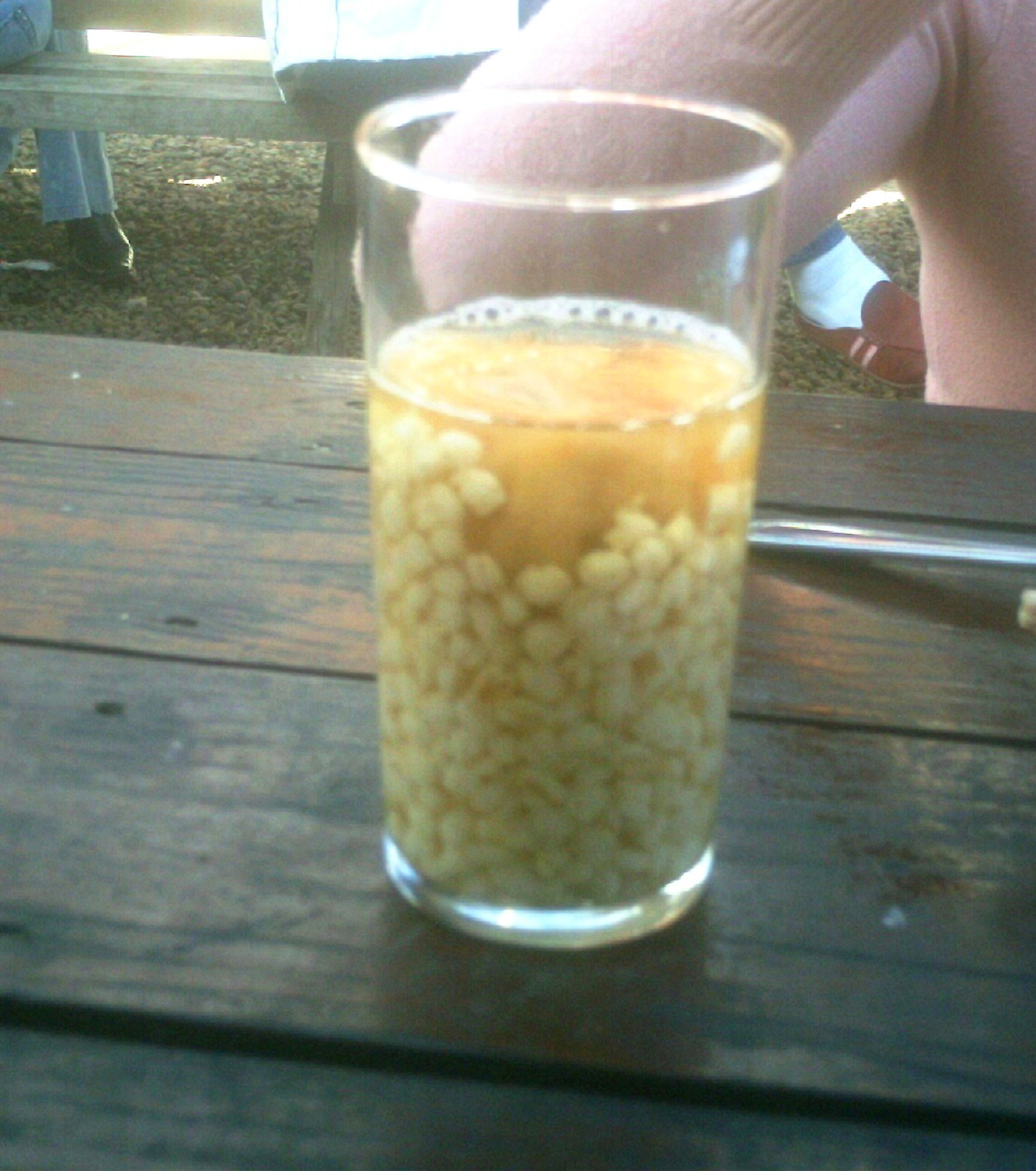 Vaso de mote con huesillos, un postre tradicional de Chile.